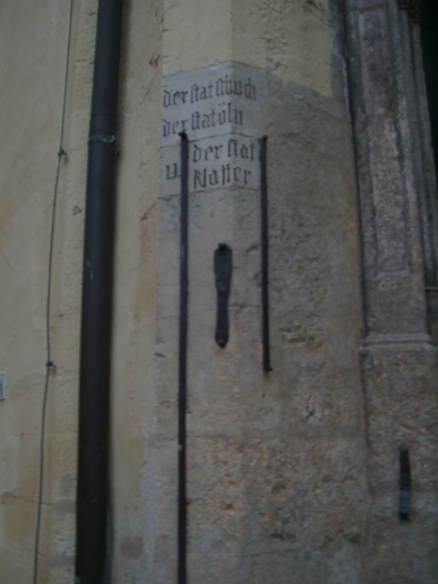 Maße am alten Rathaus in Regensburg. Die Inschrift lautet: "der stat schuch der stat öln u. der stat klafter" ("the city's foot, ell and fathom")